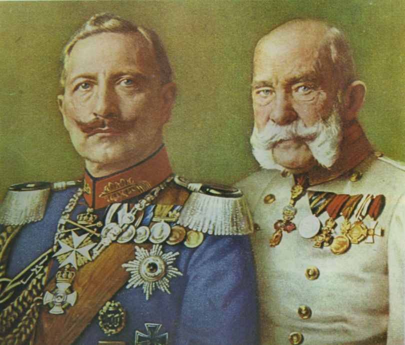 Ritratti di Francesco Giuseppe I d'Austria e Guglielmo II di Germania